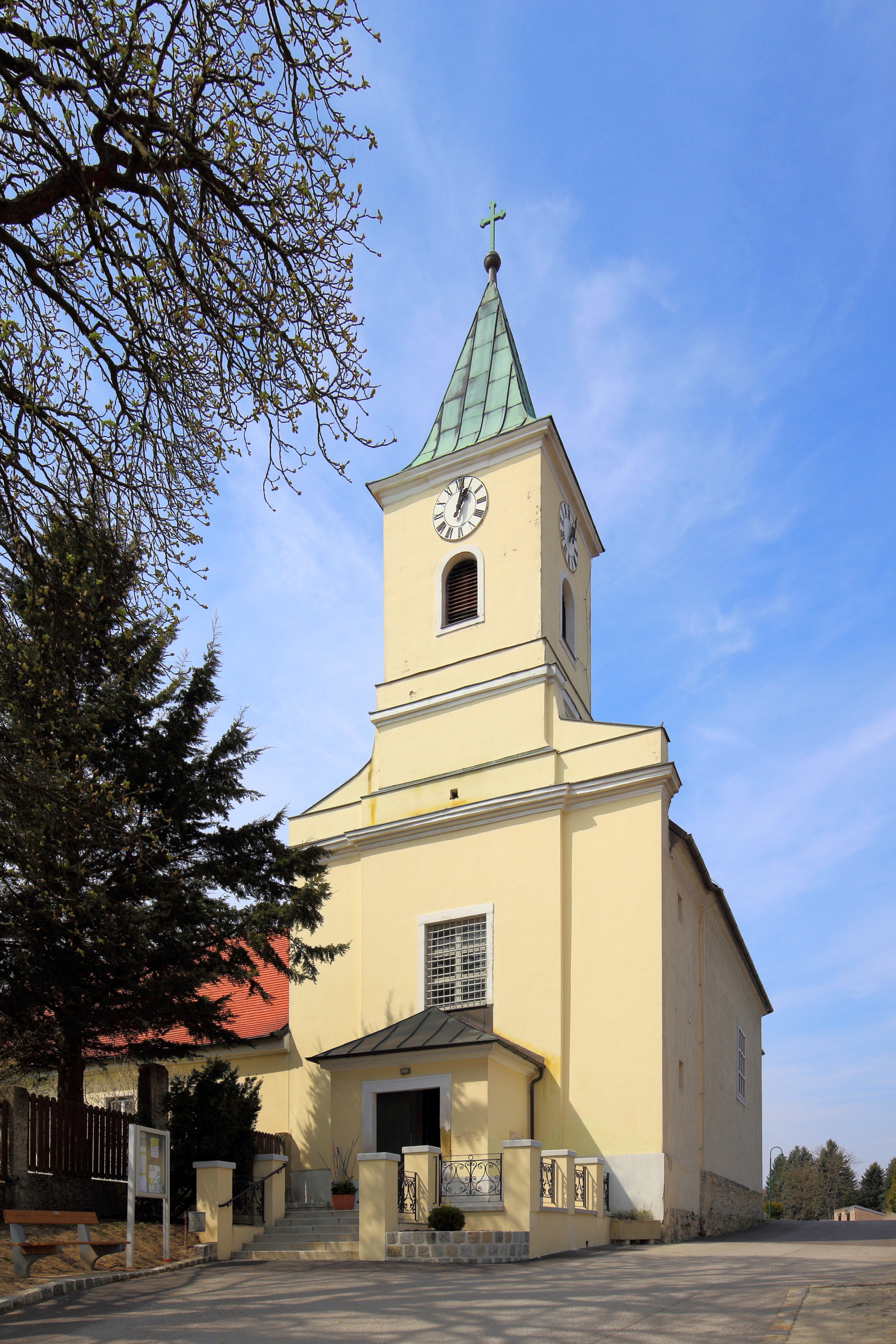 Südostansicht der katholischen Pfarrkirche hl. Antonius von Padua in Manhartsbrunn, ein Ortsteil der niederösterreichischen Marktgemeinde Großebersdorf. Ein josephinischer Saalbau, der Ende des 18. Jahrhunderts errichtet wurde.